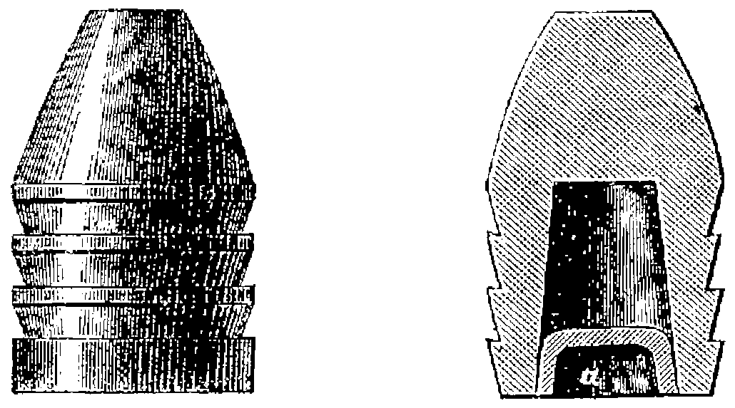 Balle à culot et coupe verticale de cette balle